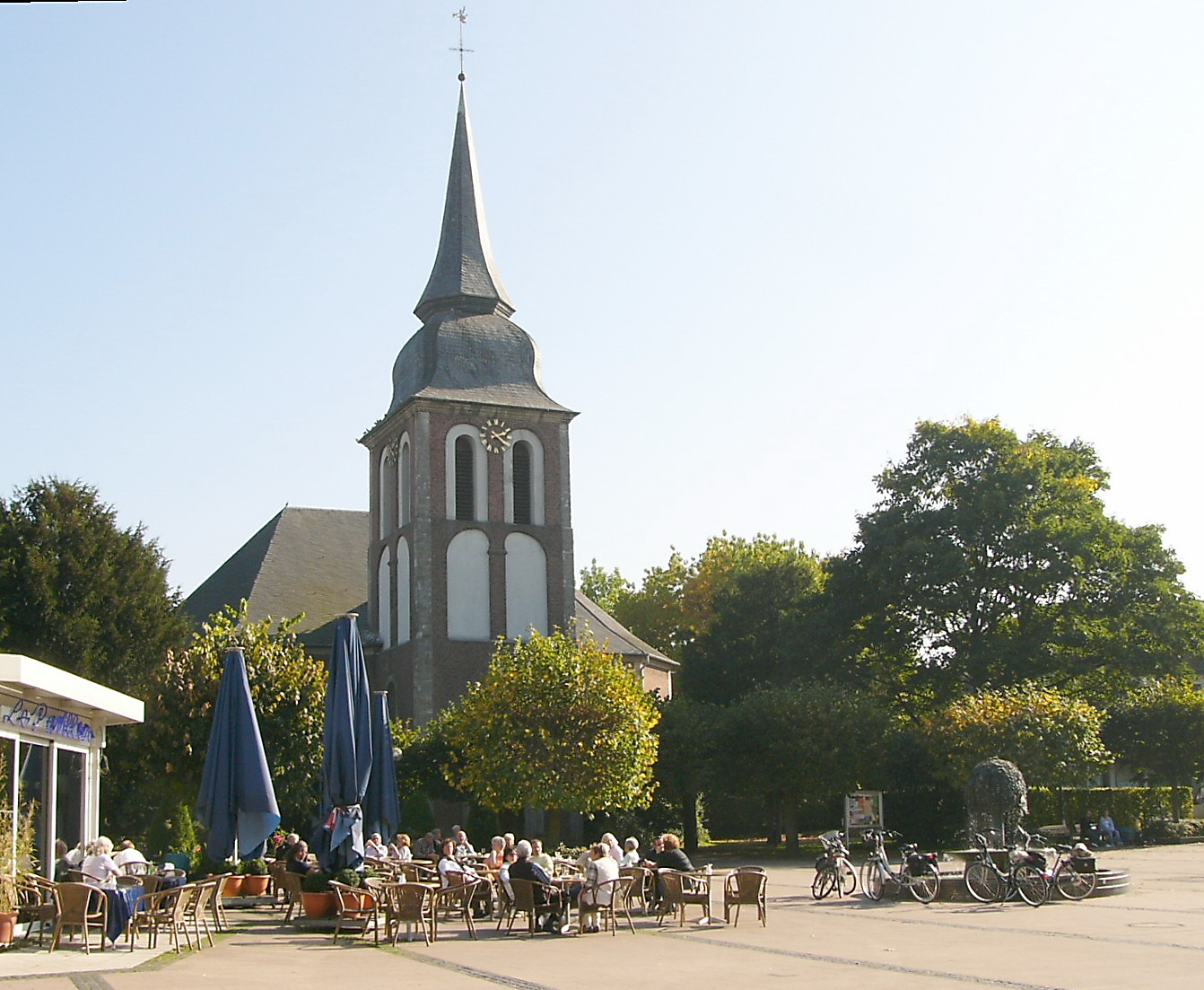 Die evangelische Kirche von 1757 am Martin-Luther-Platz, Mönchengladbach